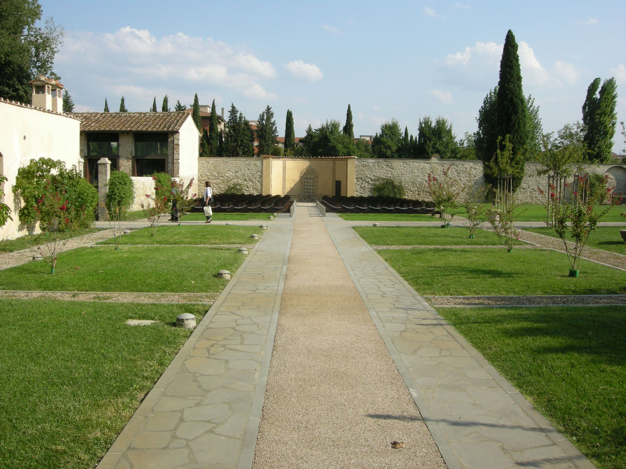 Castello dell'acciaiolo, giardino